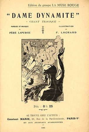 "Dame Dynamite" est une chanson de Constant Marie écrite en 1885-1886. Ici publiée en livret par le groupe de "La Muse rouge" en 1906.